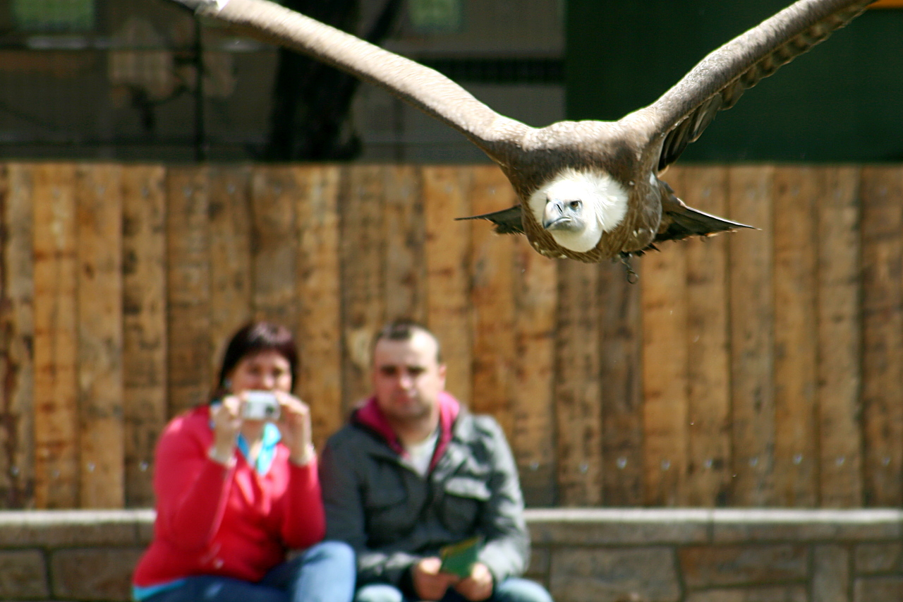 Zoo of Madrid - El cóndor pasa... Orginal text: Vale, no es un cóndor, pero la canción se me vino a la cabeza viendo el espectáculo de las aves rapaces y no se me ocurrió mejor título.